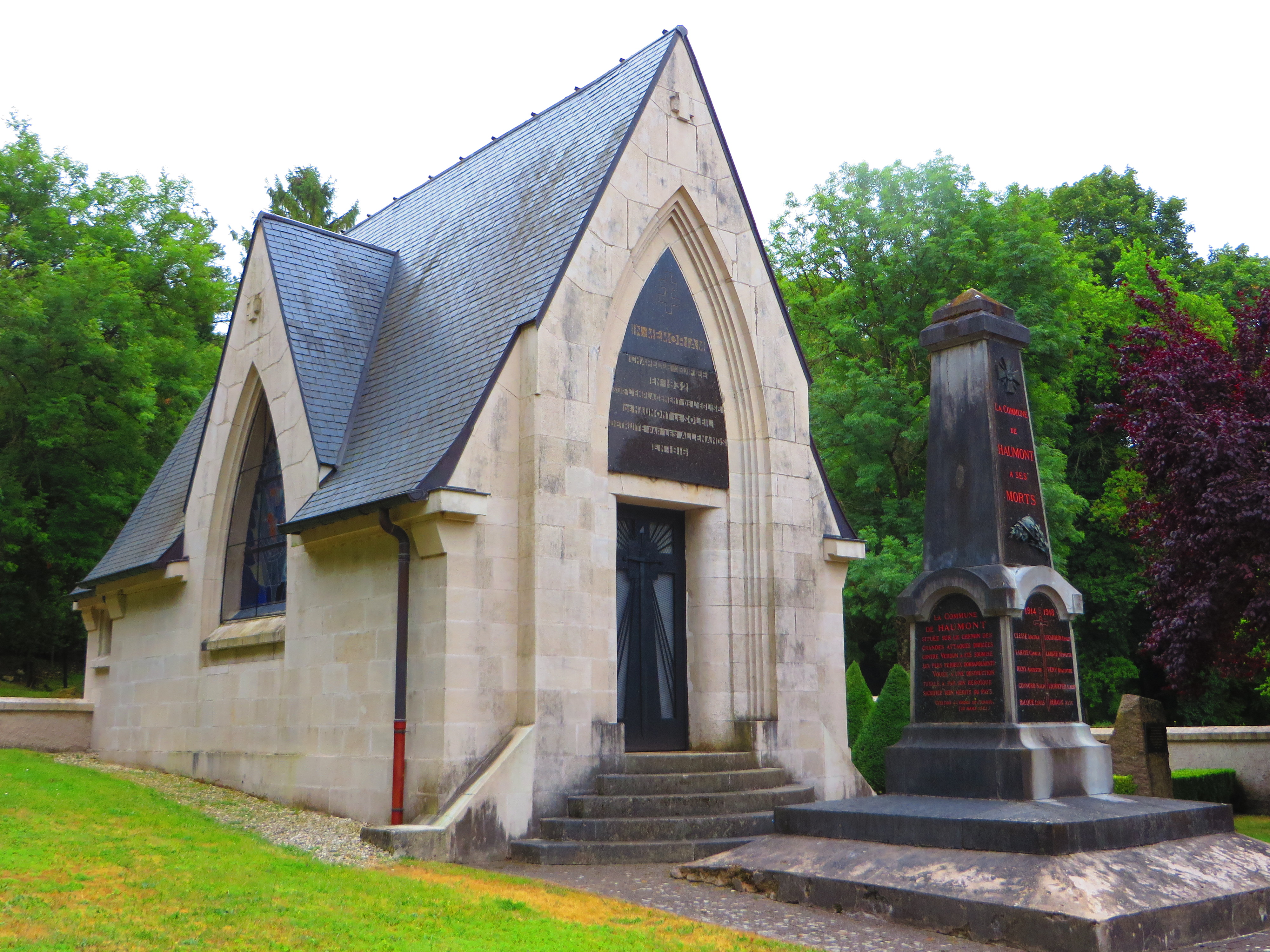 Haumont-près-Samogneux La chapelle Saint-Nicolas